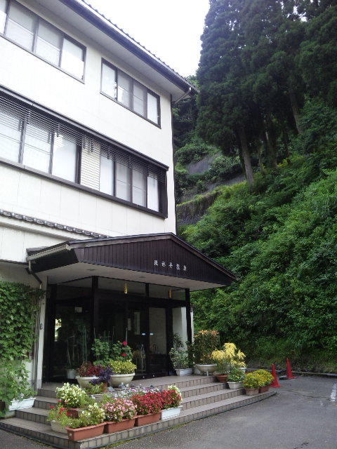 法林寺温泉